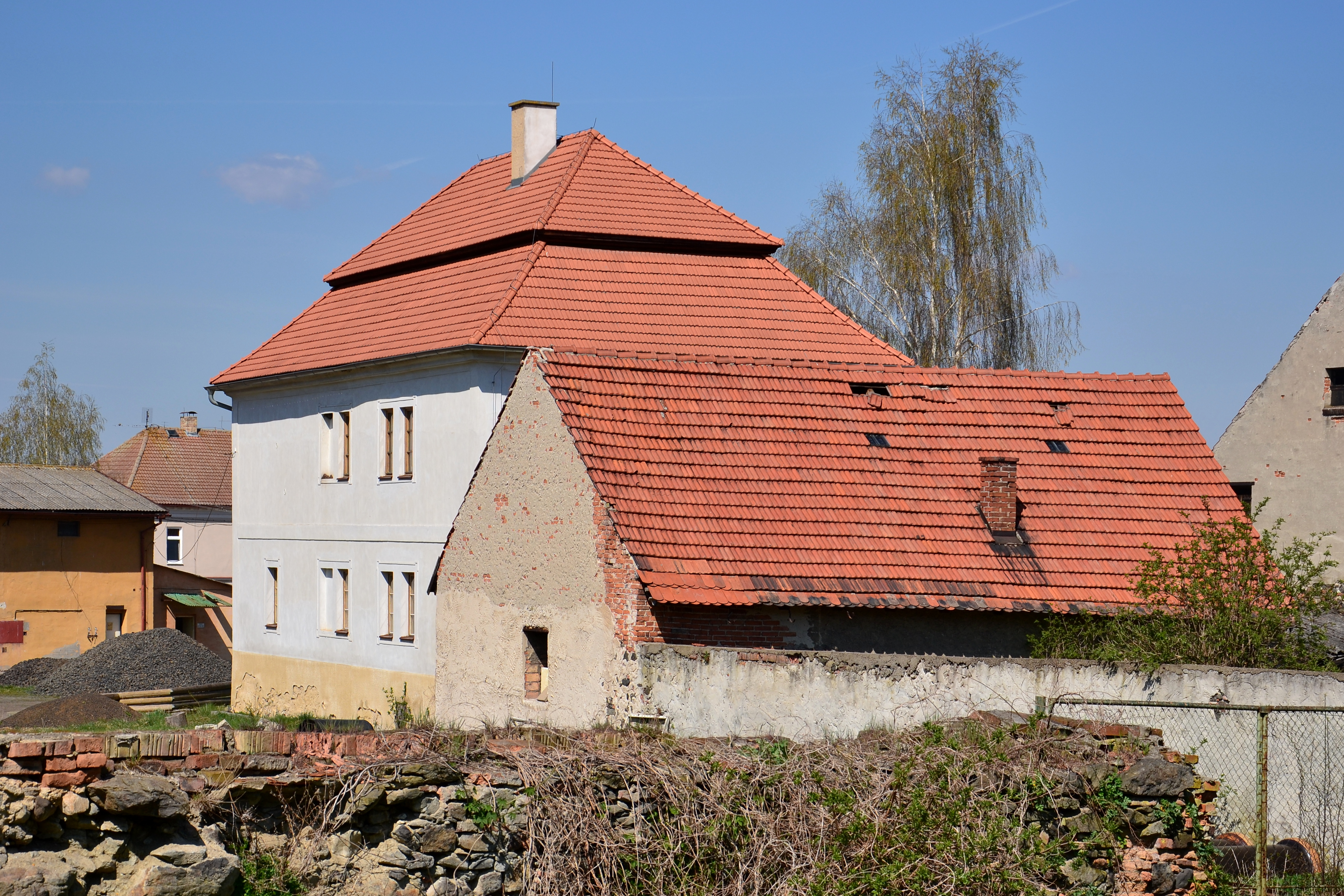 Zámek od jihu